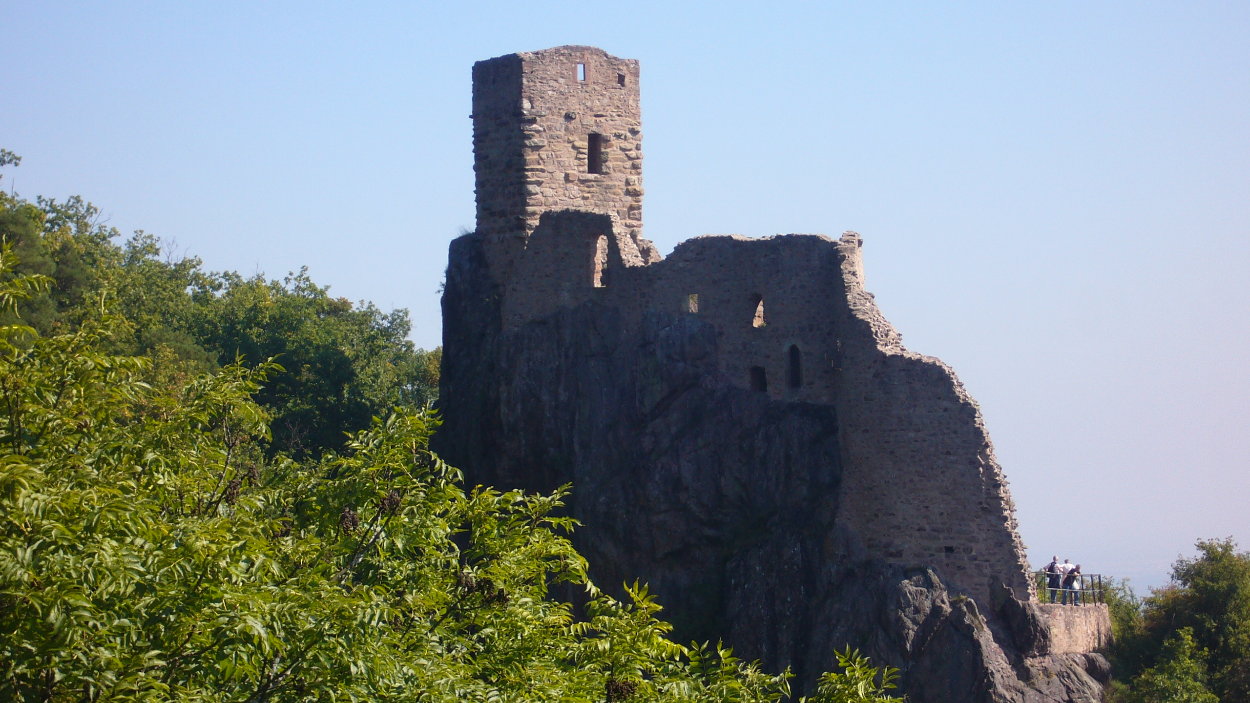 Le château du Girsberg